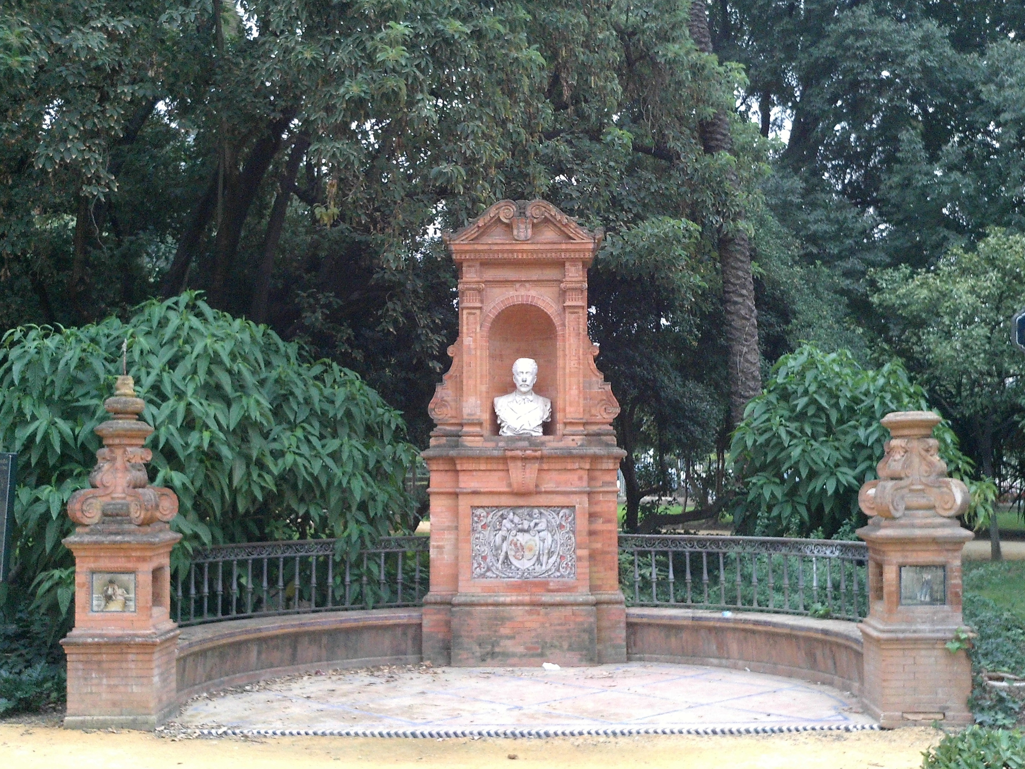 Glorieta de Matías Prat, parque de María Luisa, Sevilla, Andalucía, España.